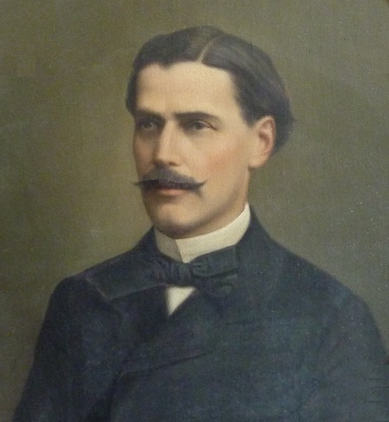 Charles Borromée Haentjens, né le 27 novembre 1821 à Port-au-Prince et mort le 21 juillet 1874 à Port-au-Prince, est un diplomate et homme politique